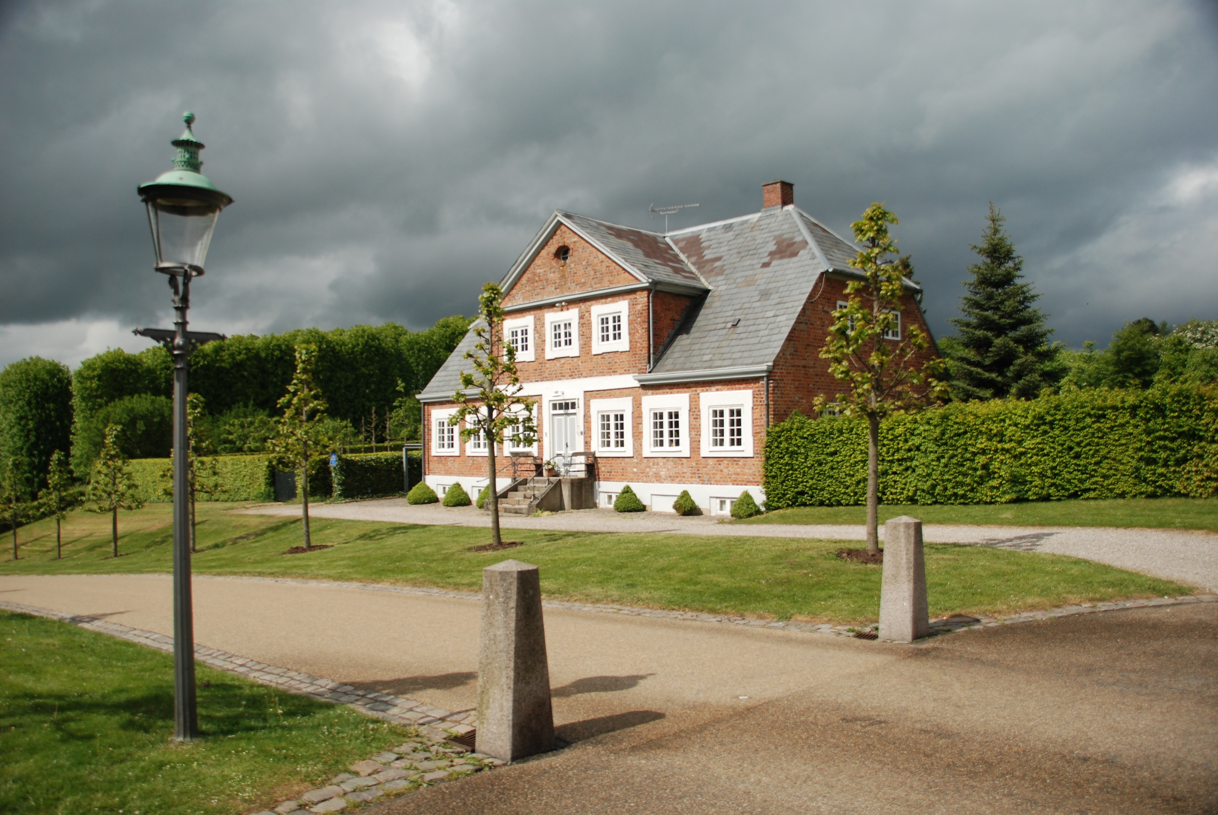 Batzkes Hus in Hillerød north of Copenhagen, Denmark